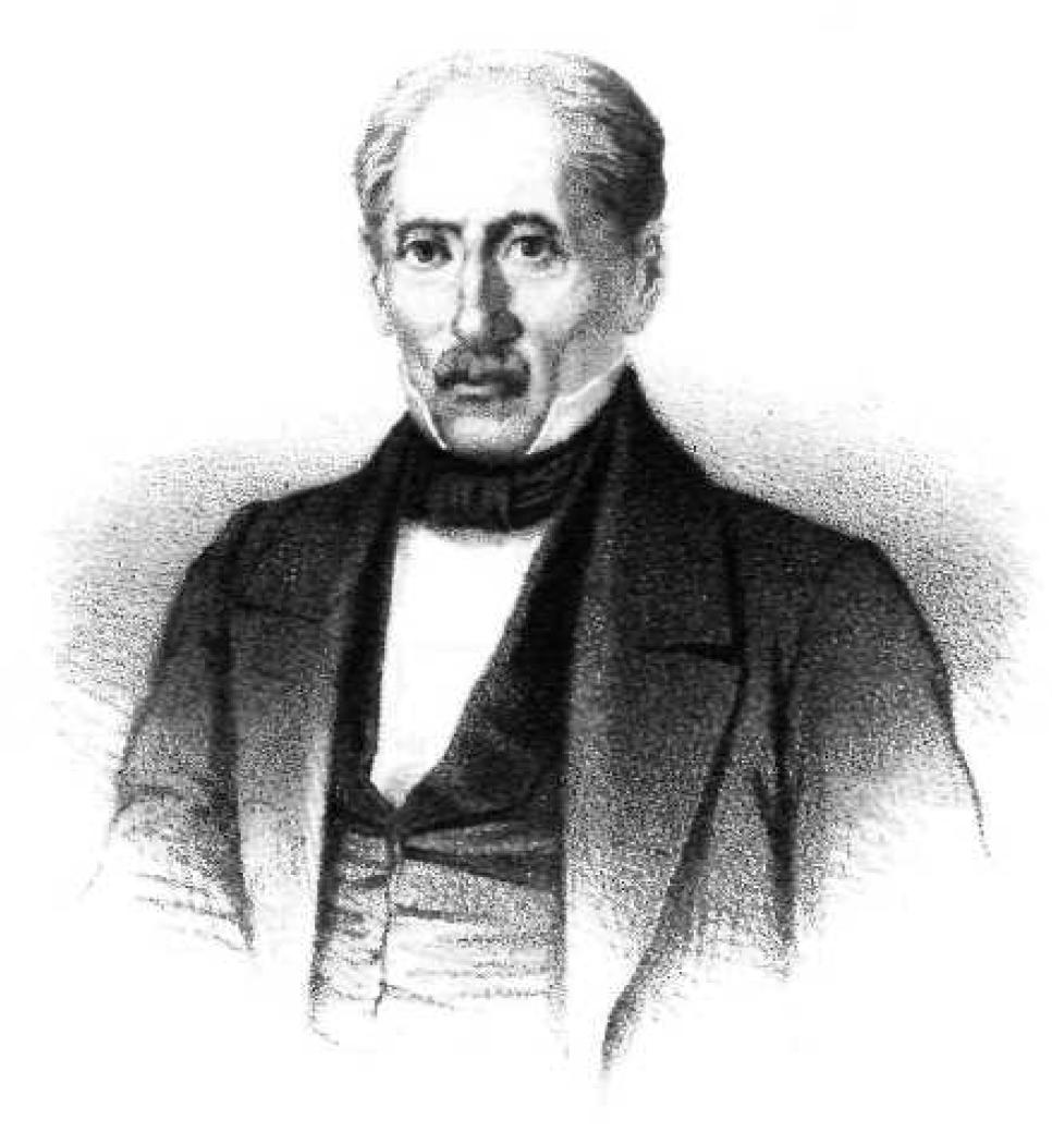 Griechischer Universitätsprofessor, 19. Jahrhundert